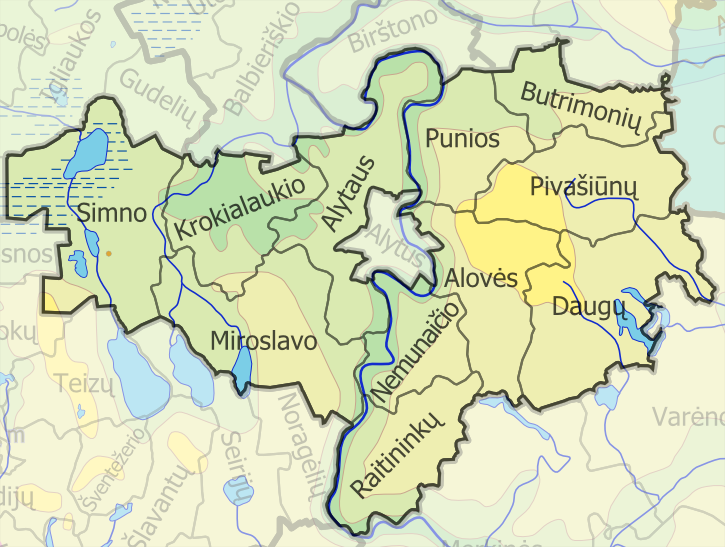 Alytaus rajono seniūnijos. Padaryta iš lt::File:LietuvosSeniunijos.png